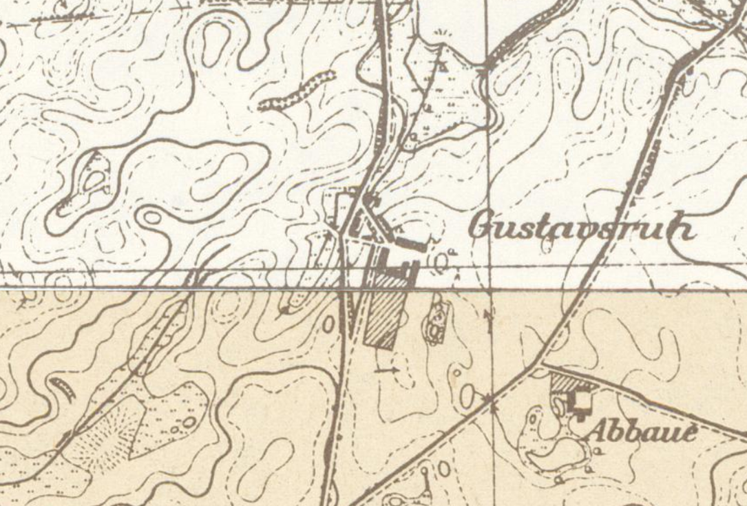 Gustavsruh, Wohnplatz der Gemeinde Gerswalde, Lkr. Uckermark, Brandenburg, Ausschnitt aus dem Messtischblatt 2848 Gerswalde von 1882 und Hassleben 2748 von 1882 kombiniert